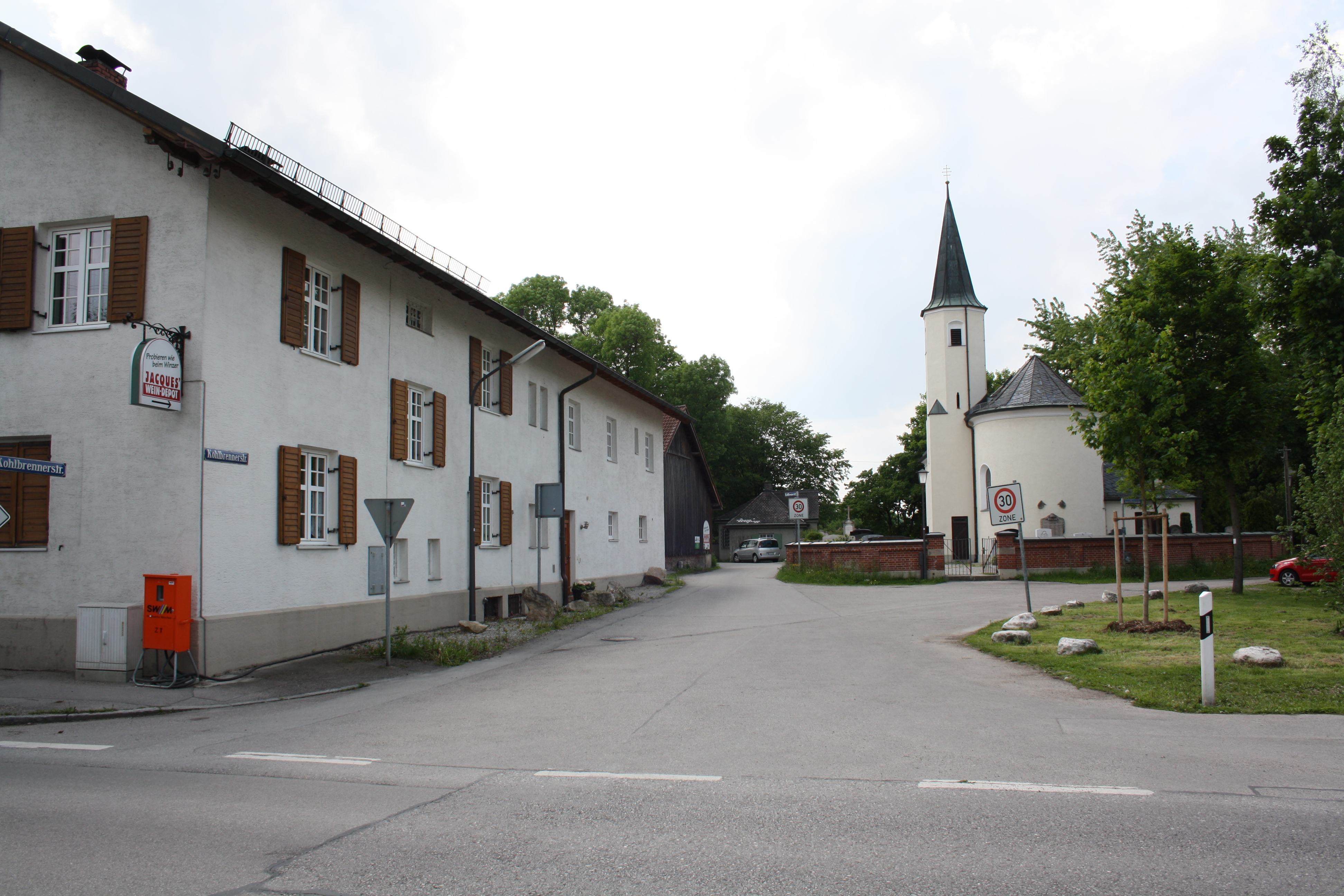 Bauernhaus und Kirche im Ortskern Daglfing